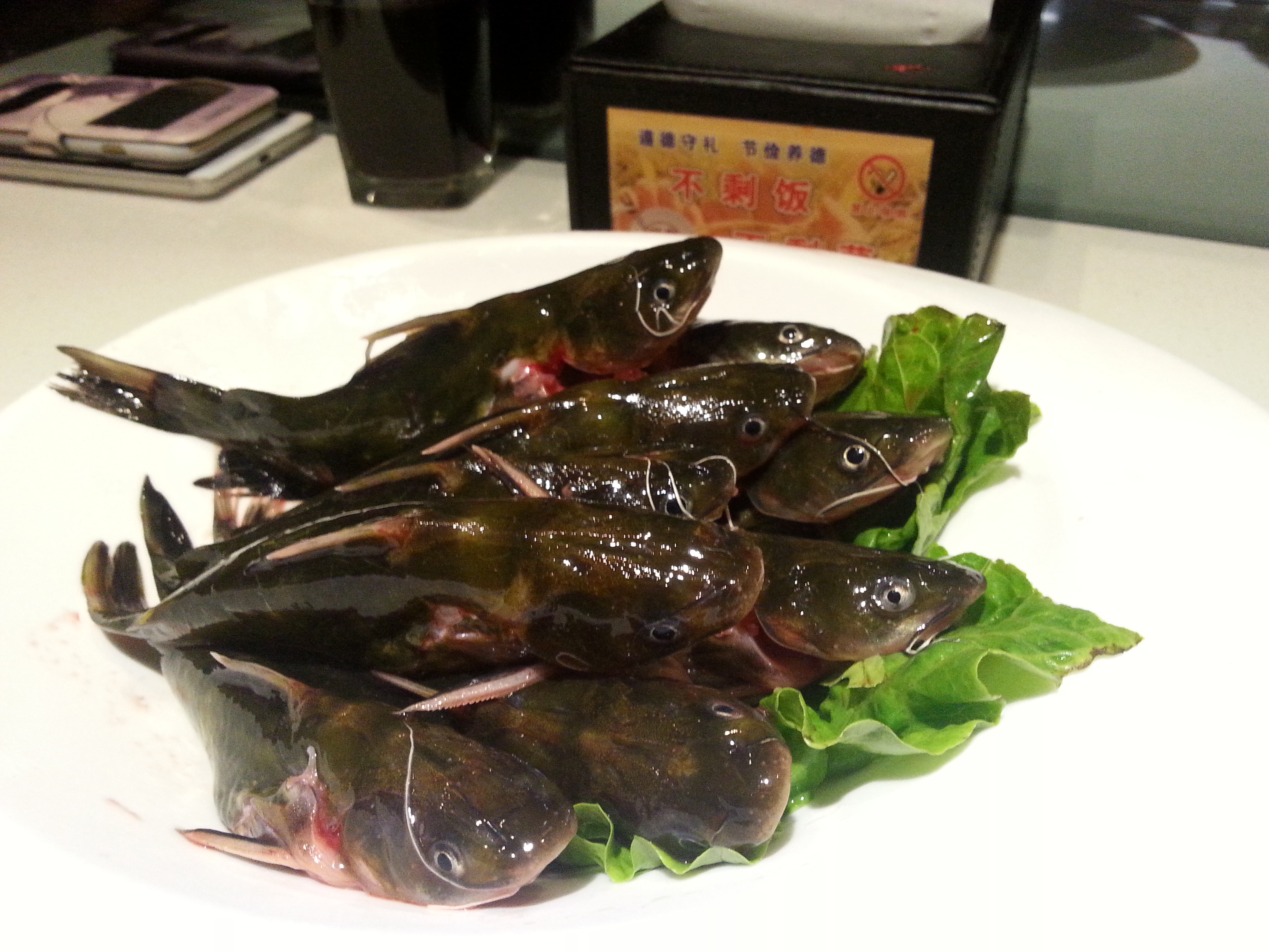 Fisch im Restaurant in Wuhan